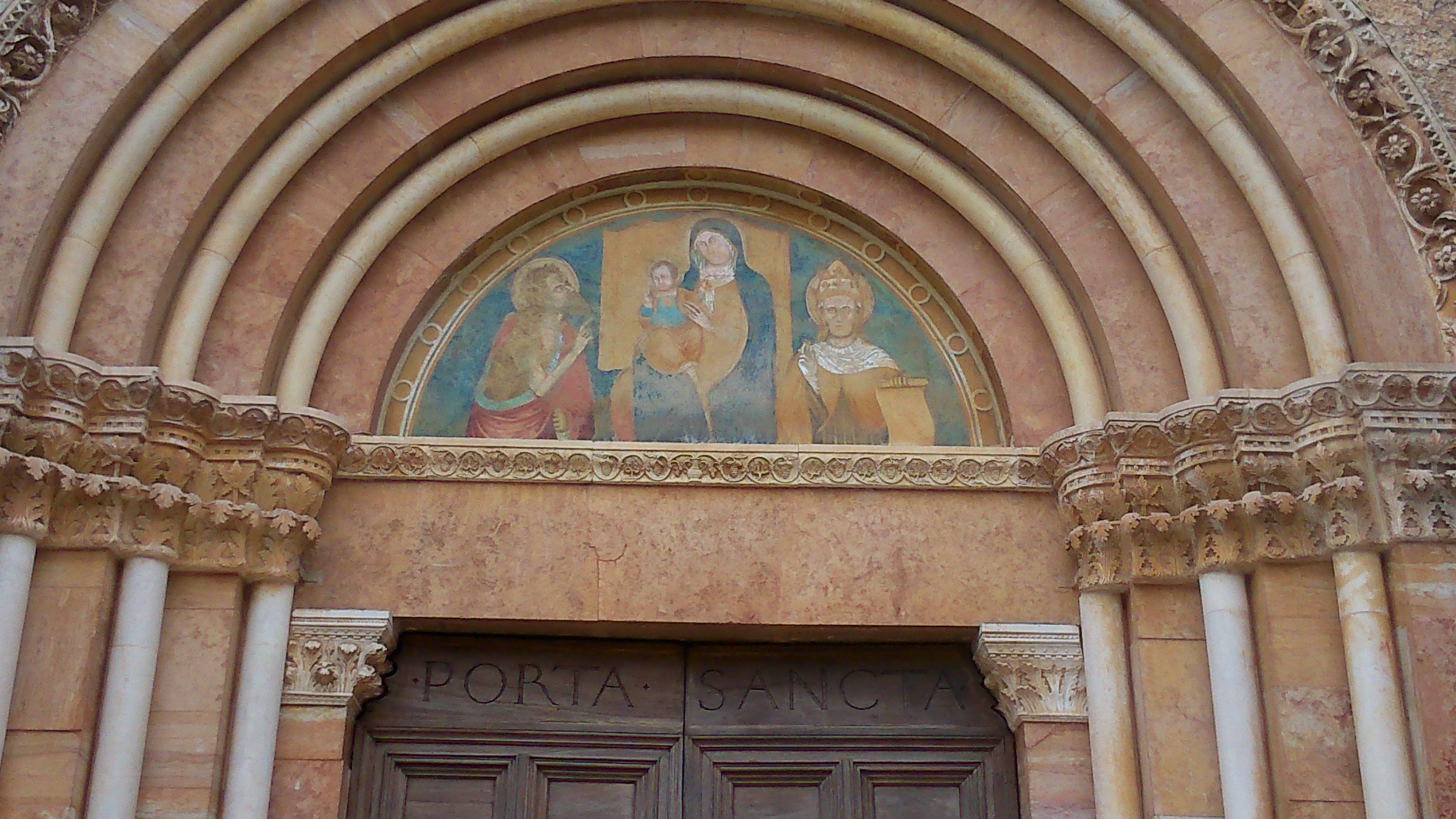 Particolare della Porta Santa della Basilica di Santa Maria in Collemaggio a L'Aqula